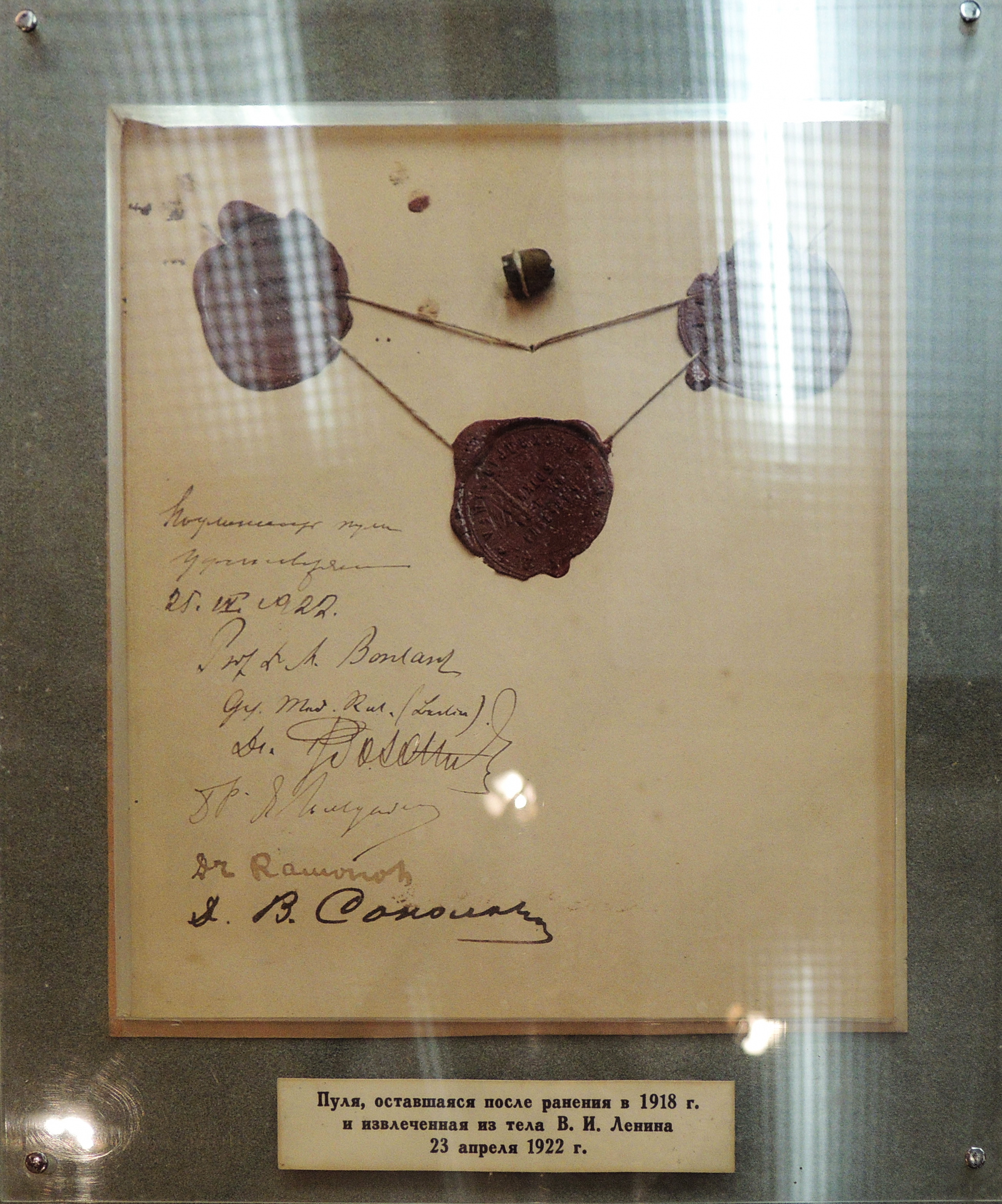 Пуля к пистолету "Браунинг". Калибр 6.30-6.39 мм. Ею был ранен Ленин в 1918 году, она осталась в его теле до 23 апреля 1922. ГИМ